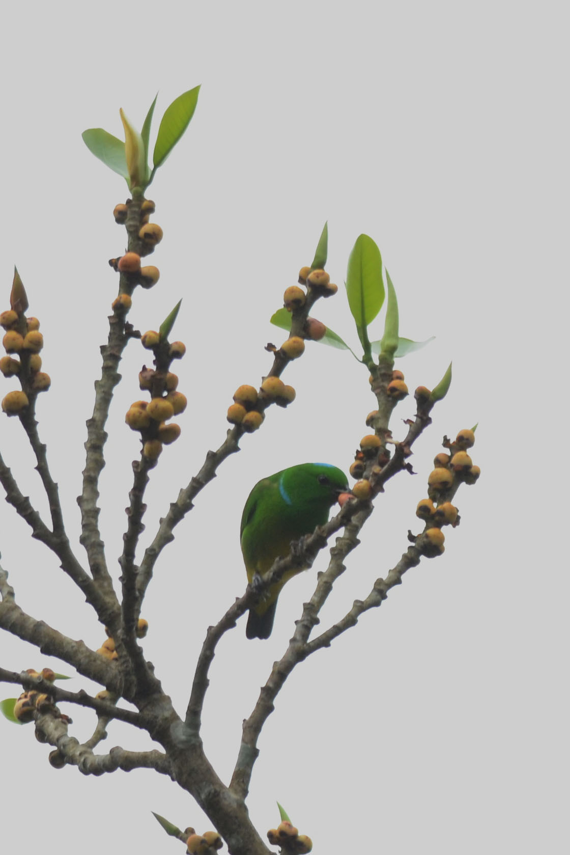 Selva El Marinero, Ejido Adolfo López Mateos, Catemaco, Veracruz, México.